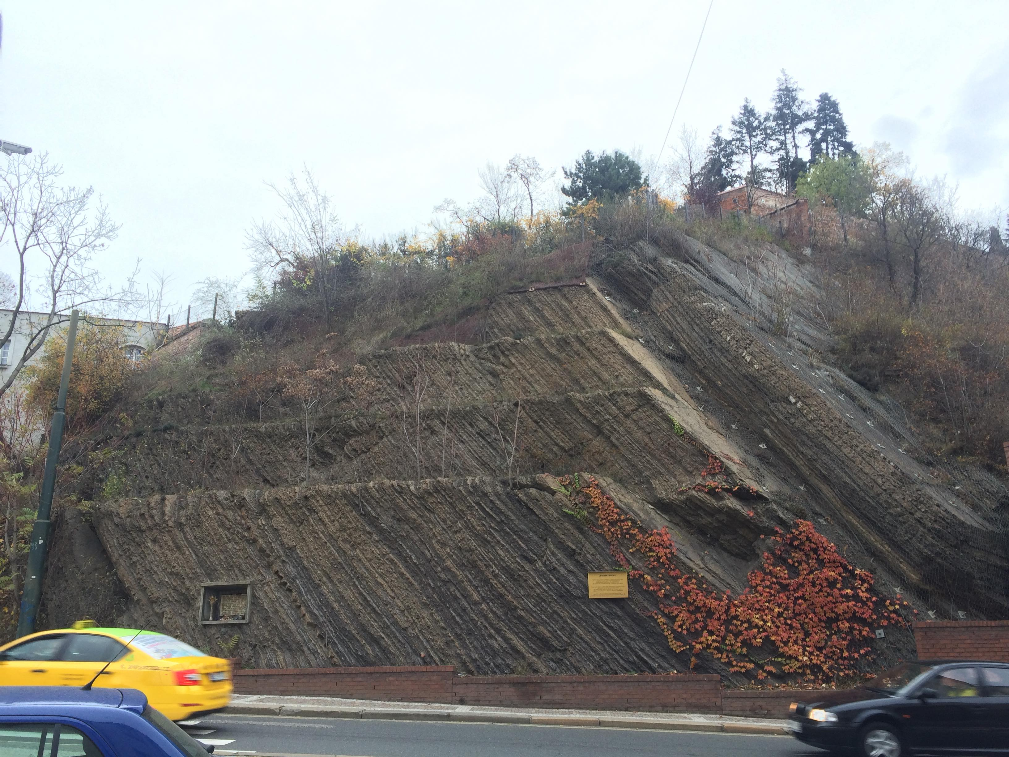 Letenský profil